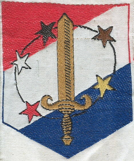 Embleem van de Troepenmacht in Suriname.